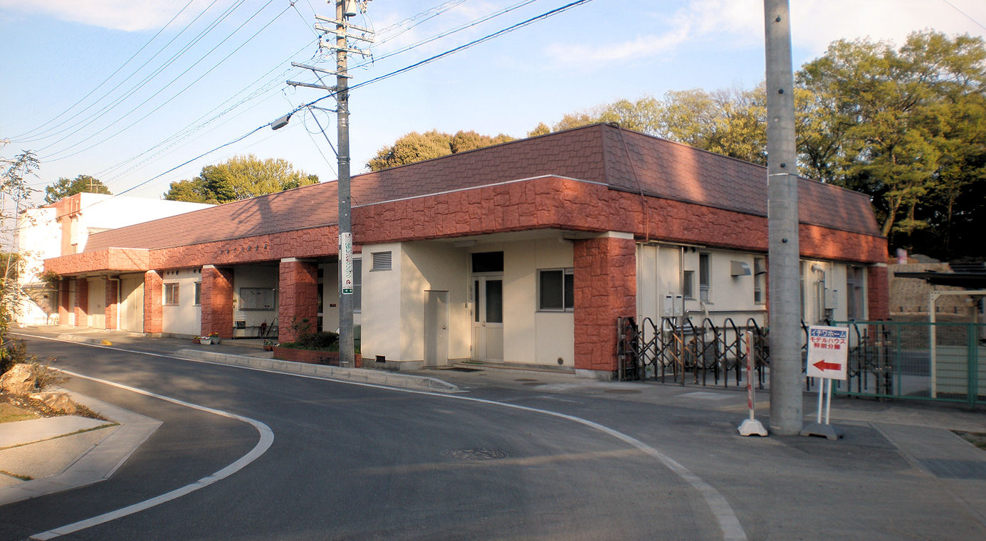 愛知県小牧市にあるいわざき授産所のパノラマ写真（ソフトウェアにて合成）